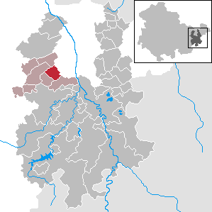 Hundhaupten in Thuringia - District Greiz